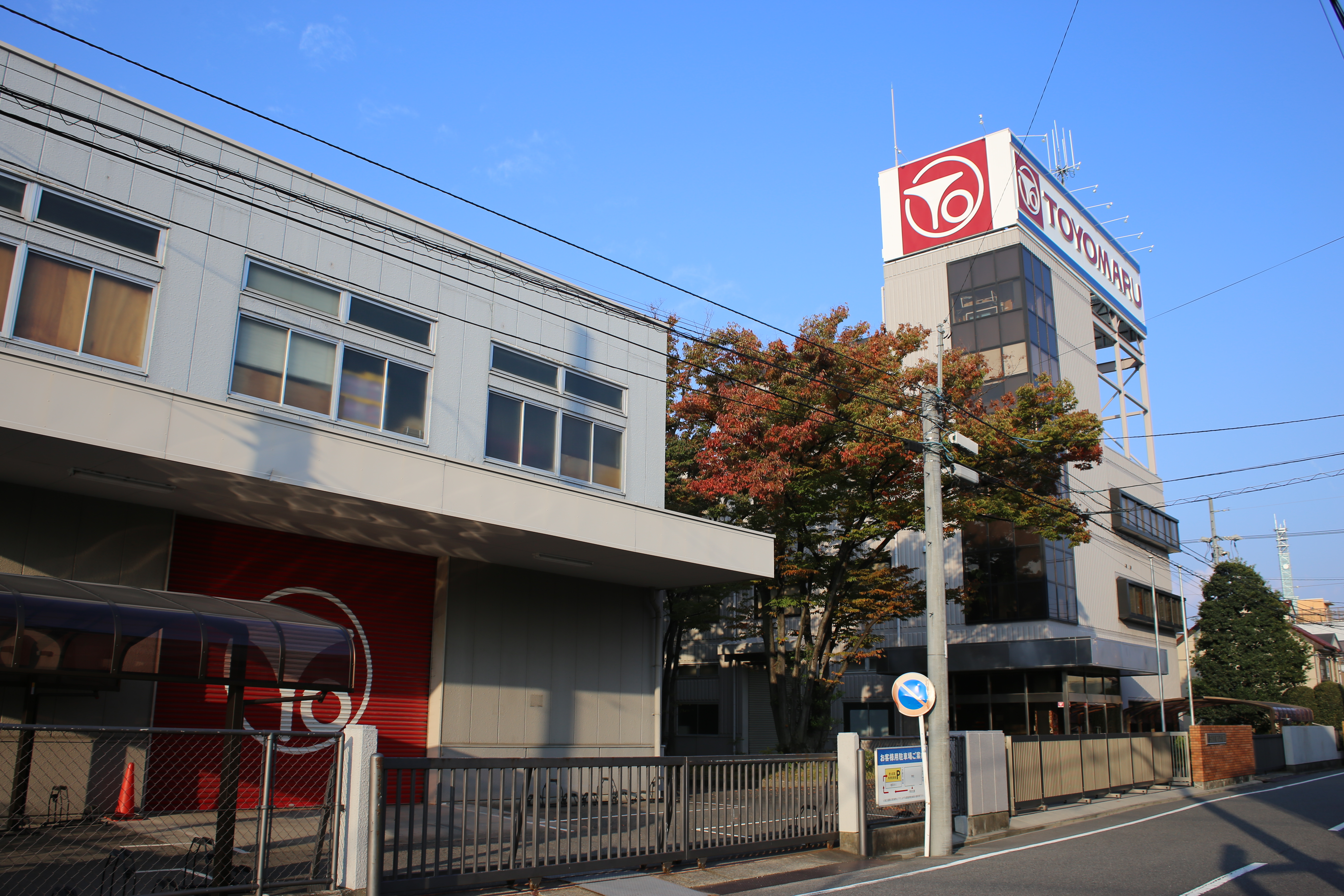 名古屋市中村区長戸井町の豊丸産業を南側公道西側より撮影